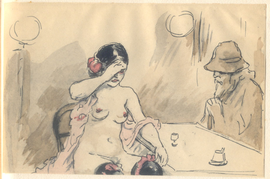 Adolphe Willette: Madeleine, Monologue et 9 dessins. Paris: D'Alignan, Editeur, 1920. Fac-similé d'un cahier de Willette tiré à 250 ex. (Texte calligraphié daté de juillet 1911; monologue d'une prostituée à la veille de Noël